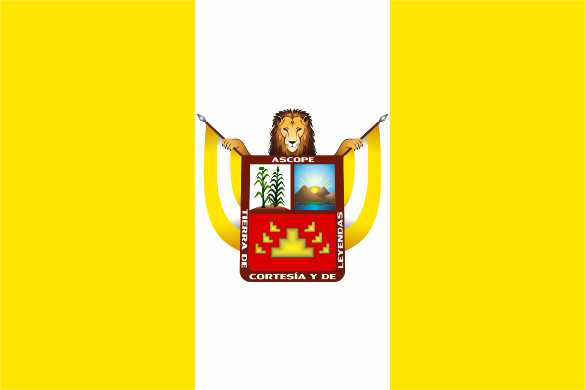 bandera ascope